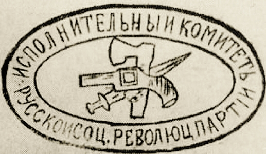 Simbolo del Comitato Esecutivo del Sud di Valerian Osinskij